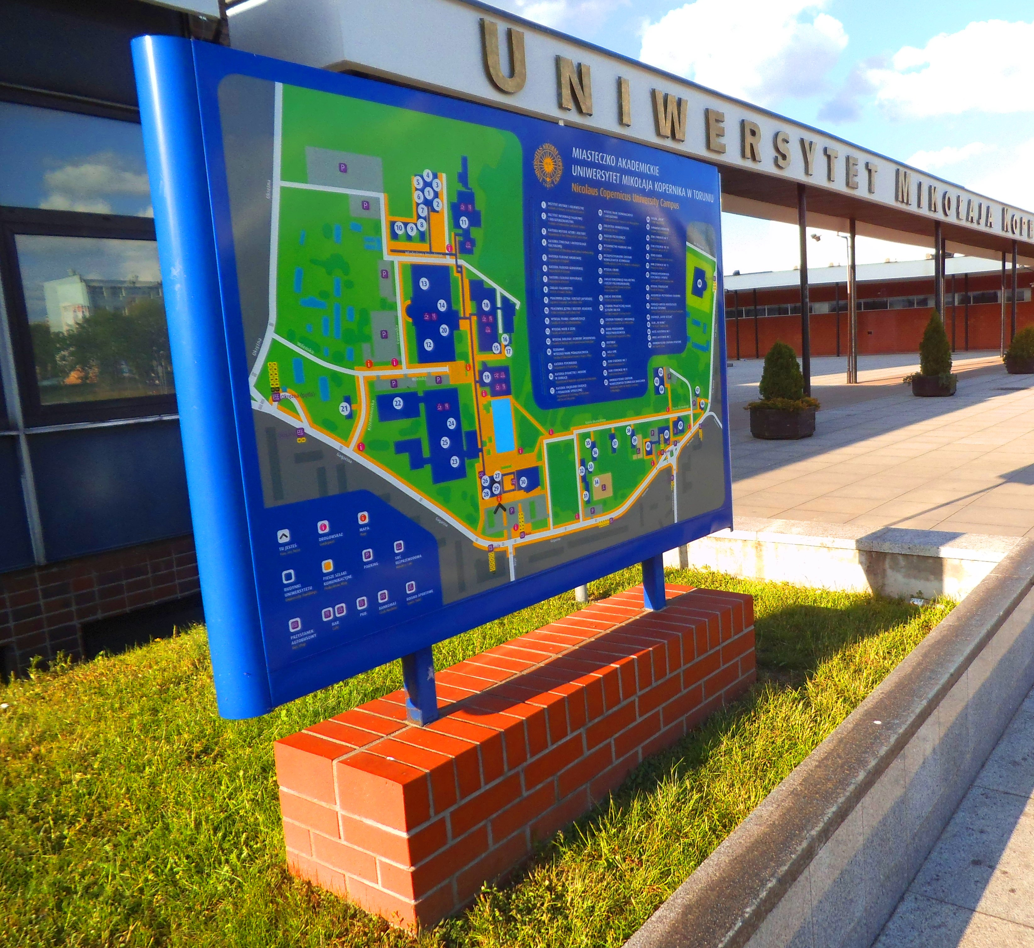 Plan Miasteczka Uniwersyteckiego na Bielanach w Toruniu